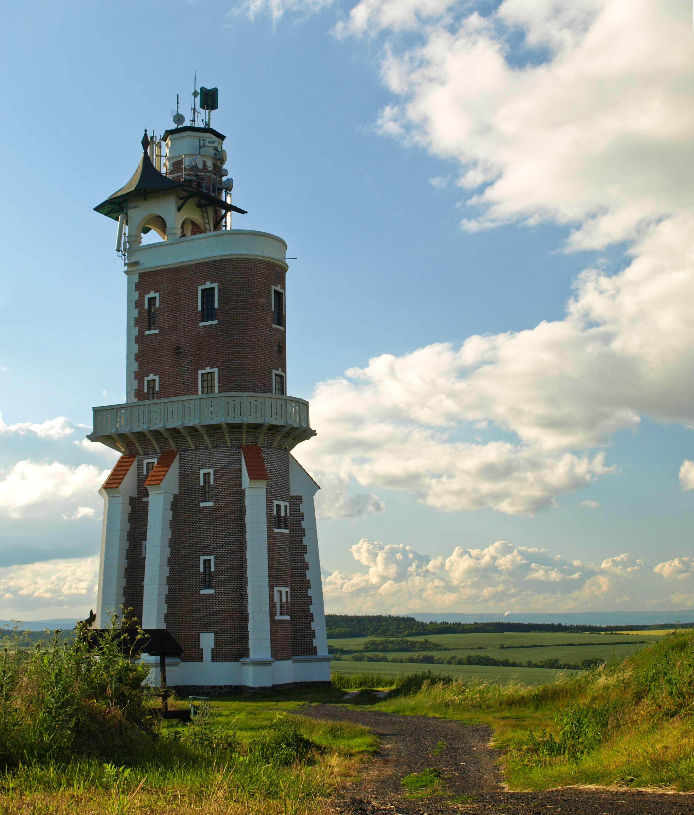 Schillerova rozhledna v Kryrech